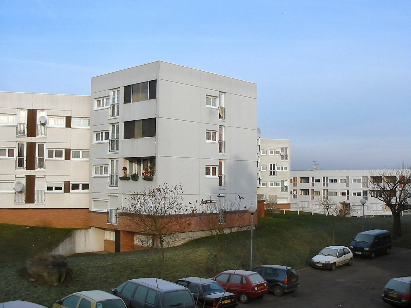 La cité des Provinciales à Brunoy (Essonne).